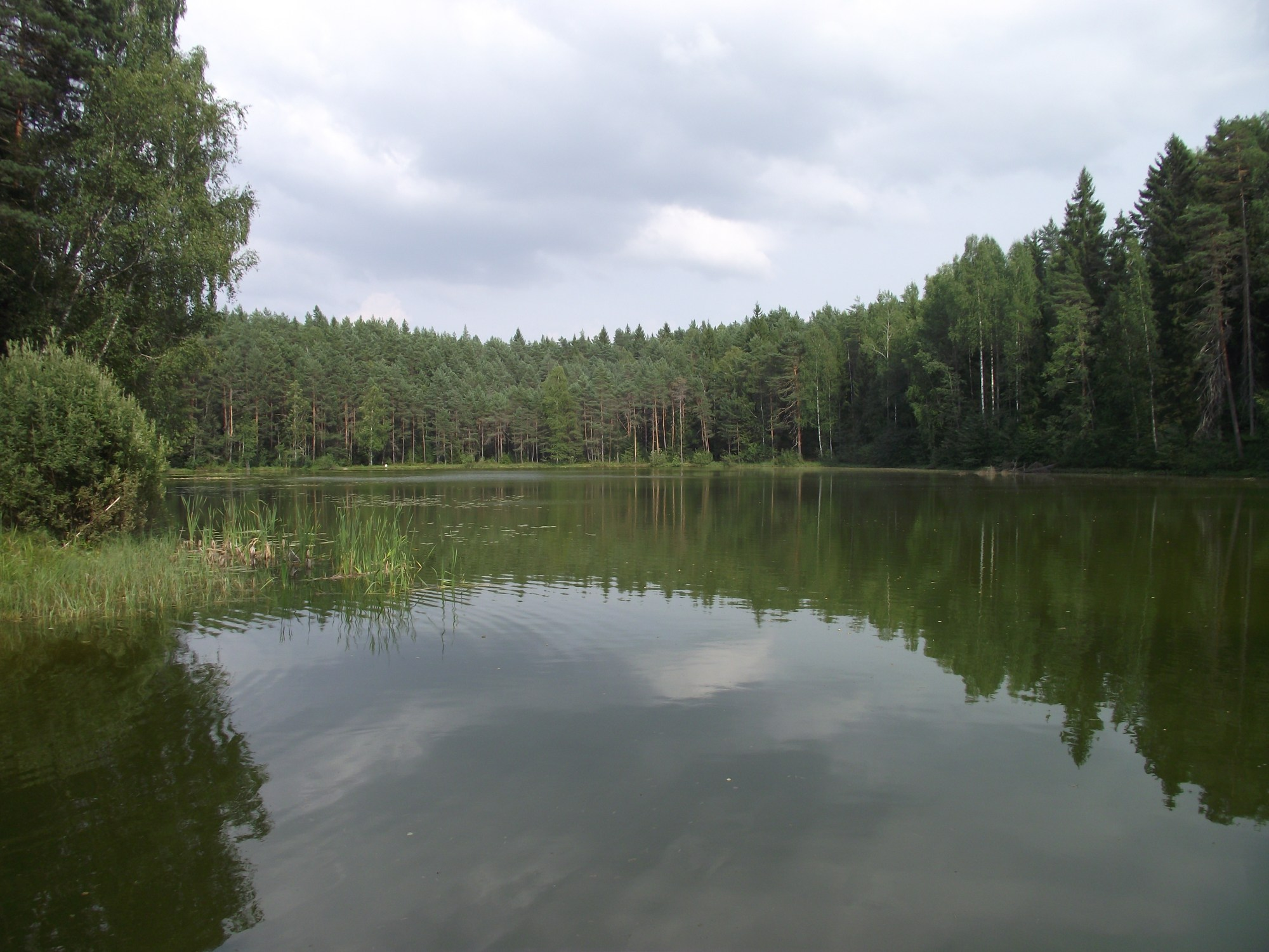 Jõuga Pesujärv Ida-Virumaal.